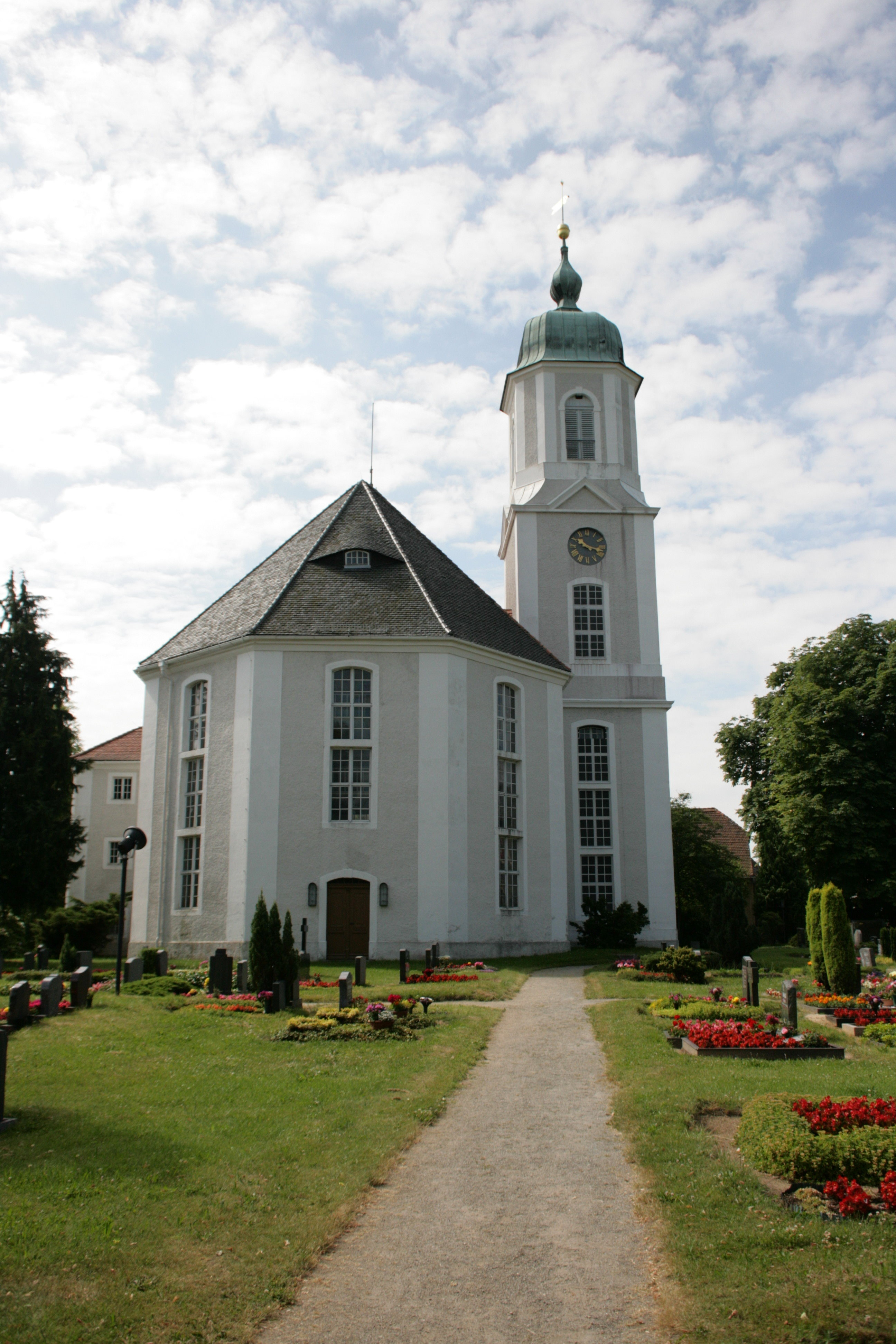 Evangelische Autobahnkirche (Parochialkirche Peter & Paul), Taucherwaldstraße 73, Uhyst am Taucher, Burkau